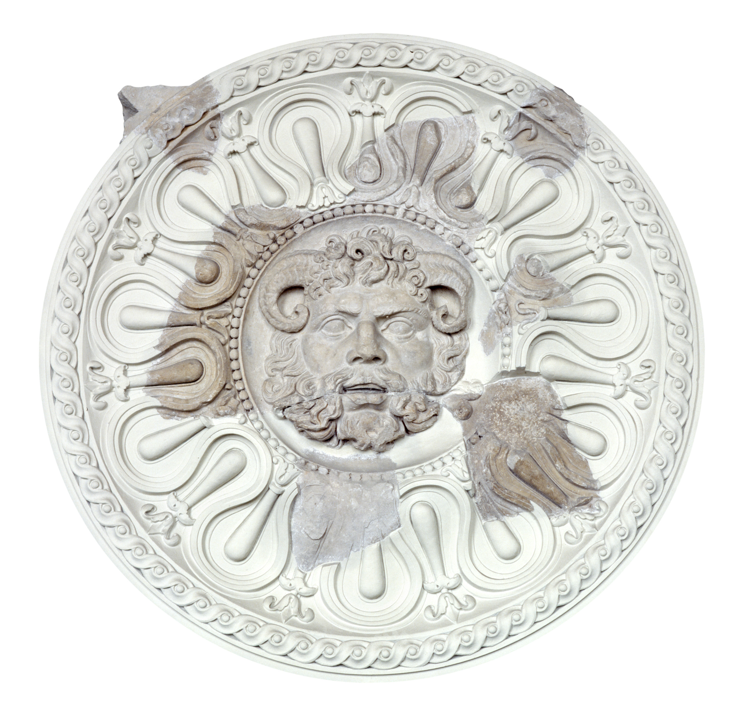 Medalló monumental (clipeus) amb la representació de Júpiter-Ammó, que formava part de la decoració arquitectònica del recinte de culte imperial de Tàrraco. MNAT 117